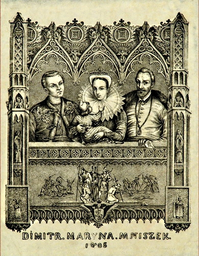 Семья Марины Мнишек, 1605 год. Гравюра из Национального художественного музея Беларуси. Экспонировалась в рамках выставки "Польское изобразительное искусство второй половины XVIII - первой половины XX века"